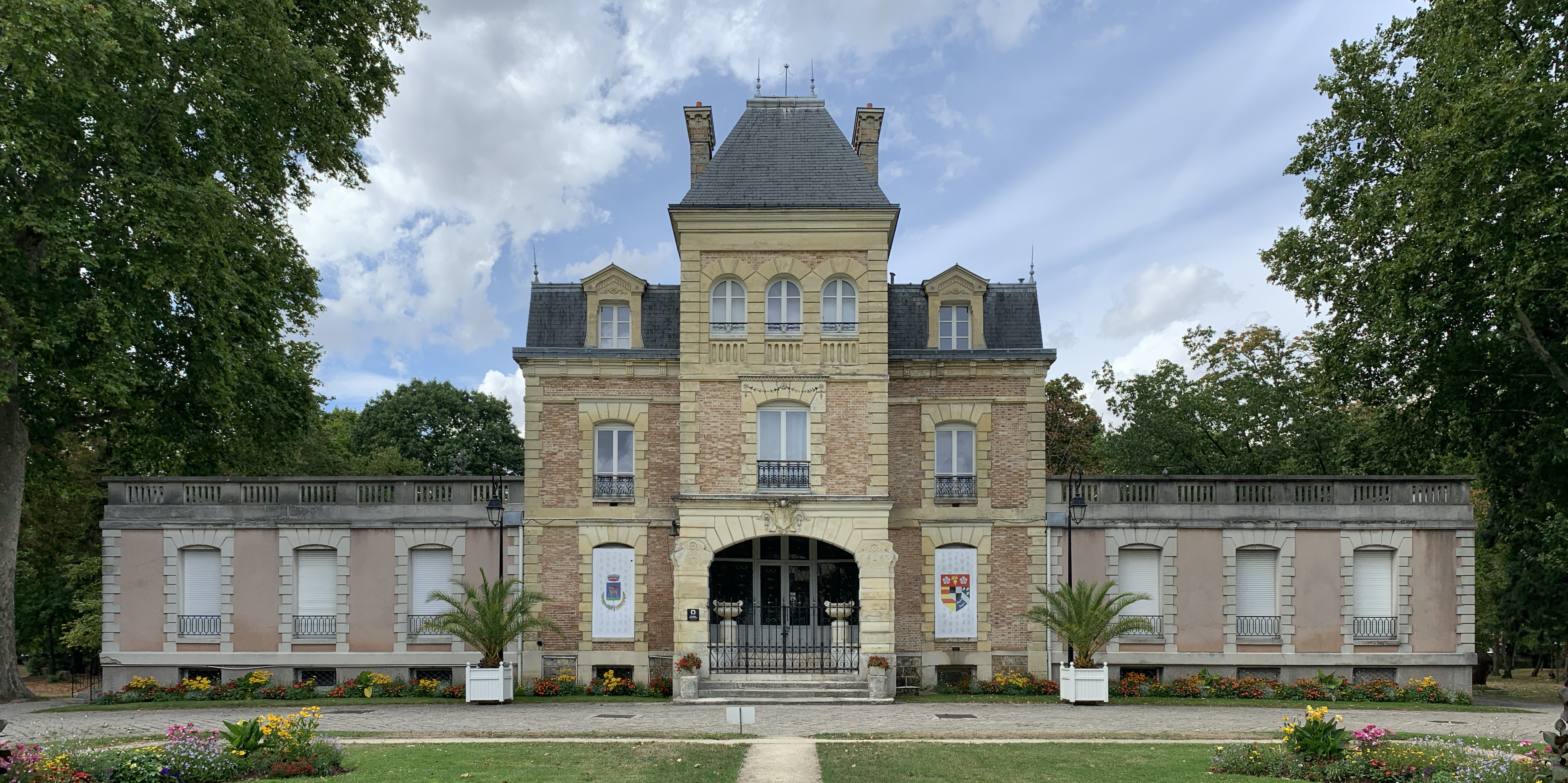 Château de la Forêt, Livry-Gargan.